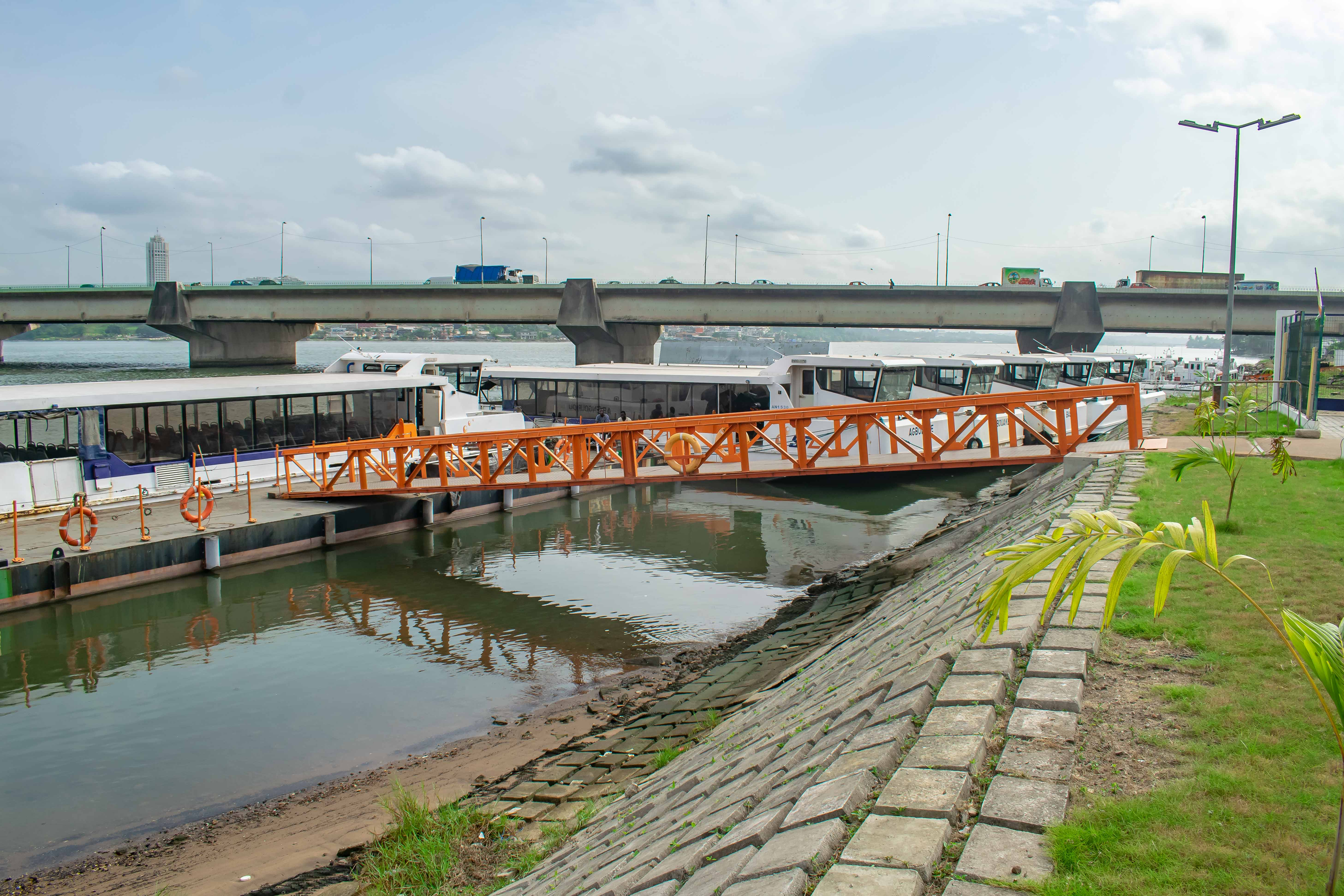 le ponton d'un quai de gare lagunaire et le pont Charles-de-Gaulle, Abidjan, Treicheville This is an image with the theme "Africa on the Move or Transport" from: Ivory Coast